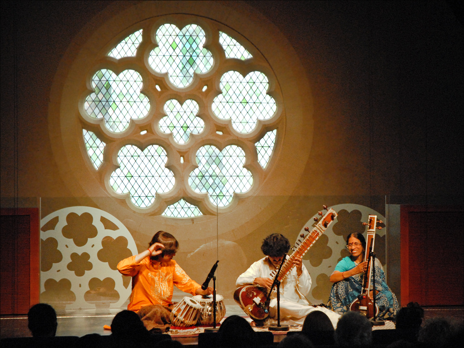 Concert d'Indrajit Banerjee, sitar avec Subrata Bhattacharya, tablas et Sudipta Rémy, tampura, le lundi 21 juin 2010, dans le grand auditorium du Collège des Bernardins dans le cadre de la Fête de la musique à Paris. voir aussi des images d'un concert d'Indranit Banerjee au musée Guimet